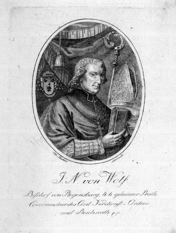 Der Bischof von Regensburg Johann Nepomuk von Wolf (1743-1829), "J. N. von Wolf Bischof von Regensburg, k. b. geheimer Rath, Commandeur des Civil-Verdienst-Ordens und Reichsrath p. p. Joh. Bichtel del. et sculp."